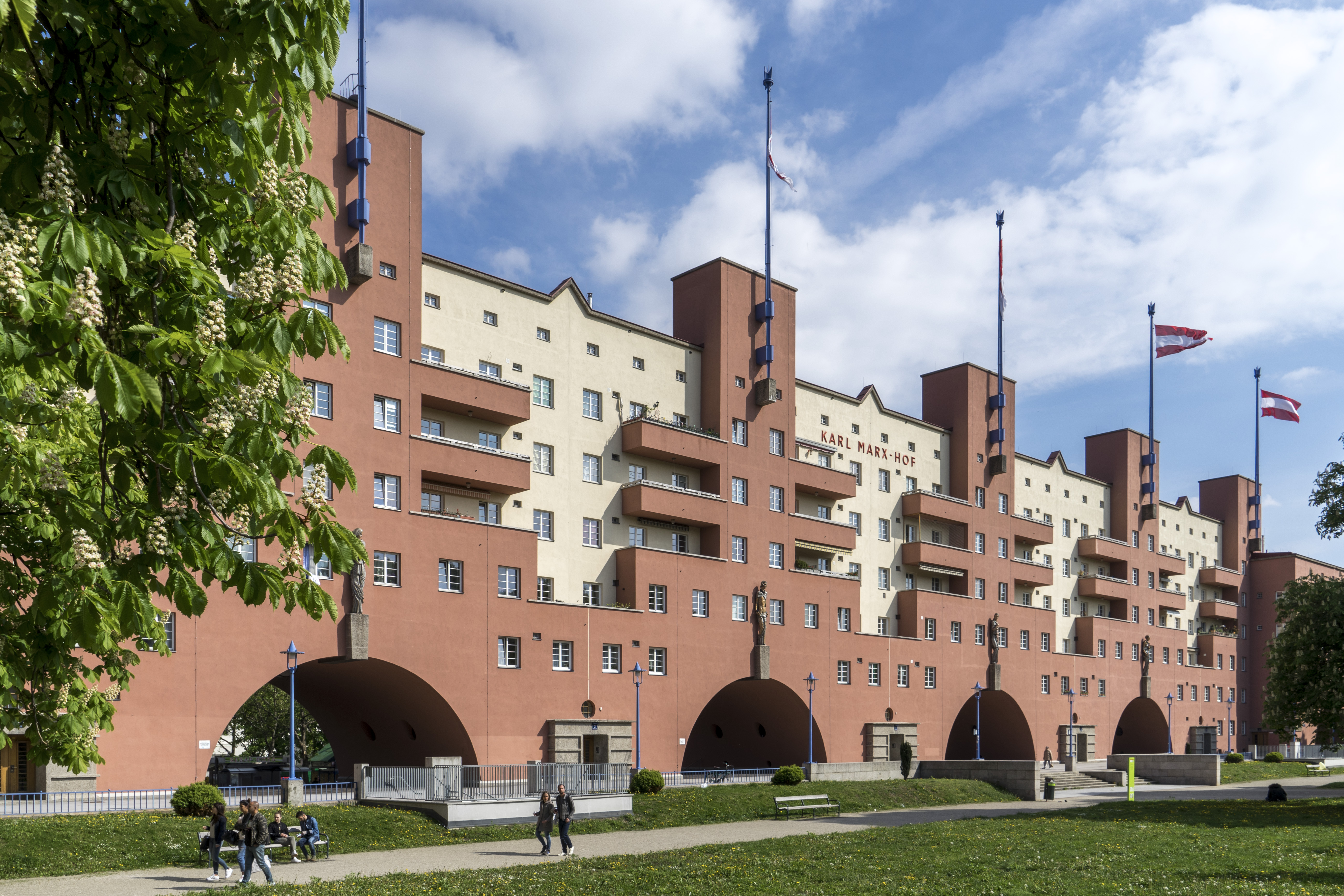 Der Karl Marx Hof in Wien Döbling gilt als Vorzeigeprojekt des kommunalen Wohnbaus der Zwischenkriegszeit in Wien. Mit über einem Kilometer Länge ist er auch eine der größten Wohnanlagen